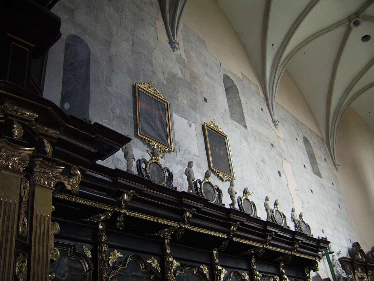 Skalbmierz - Kościół wnętrze. Prezbiterium z ścianą romańską .